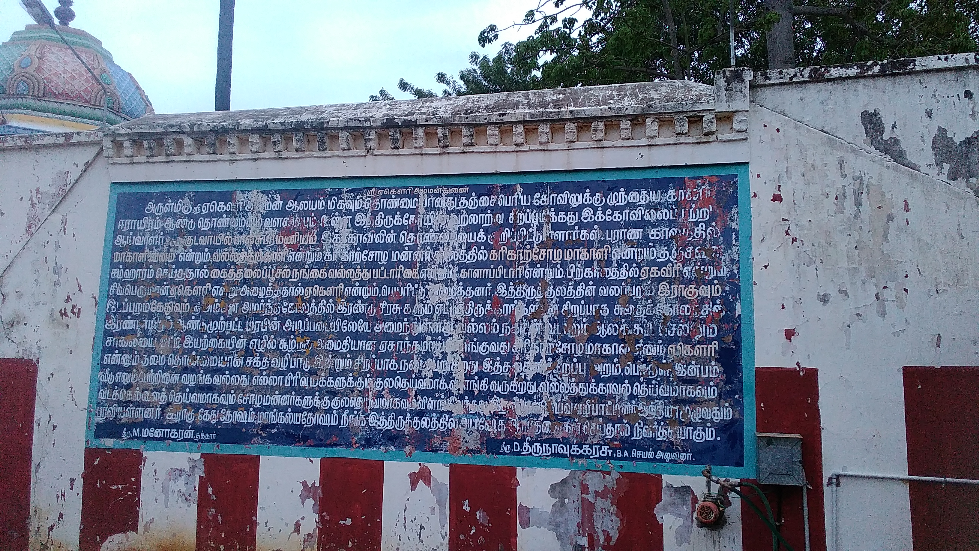 கோயிலின் வரலாறு பற்றிய தகவல்கள்